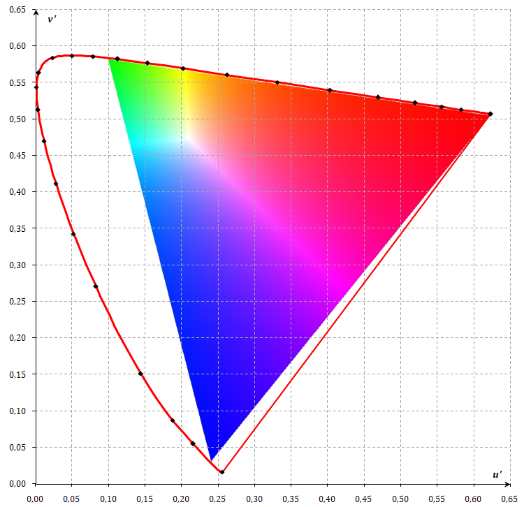 Diagramme de chromaticité à partir du système CIE U'V'W' 1976